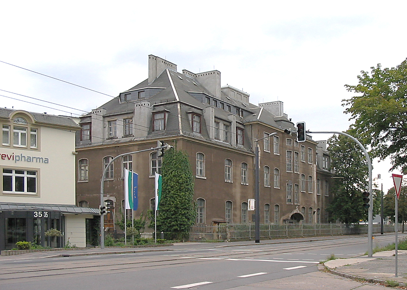 Radebeul, Chemische Fabrik v. Heyden, Meißner Straße 37